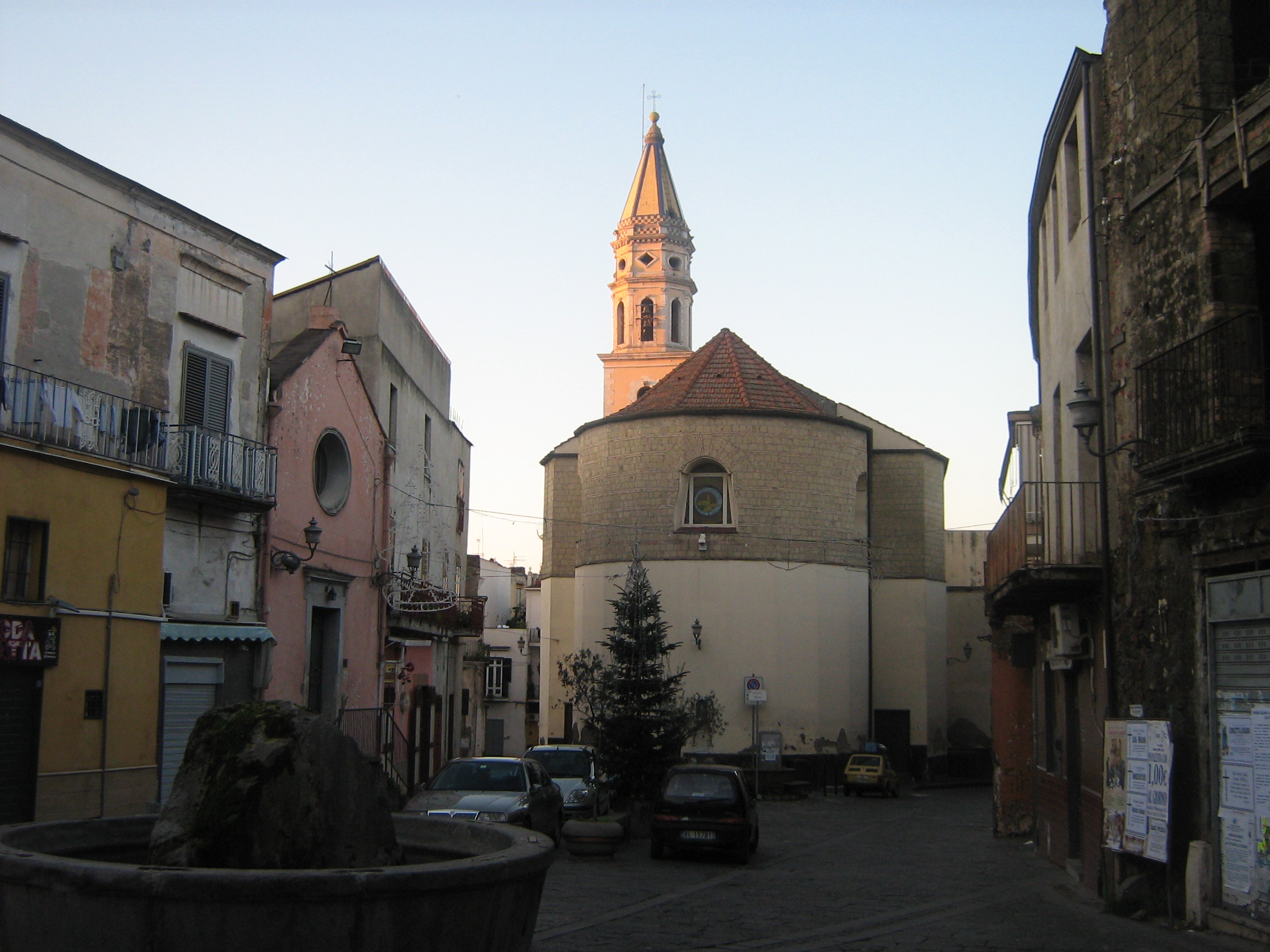 autore:Lusb 11-01-2009